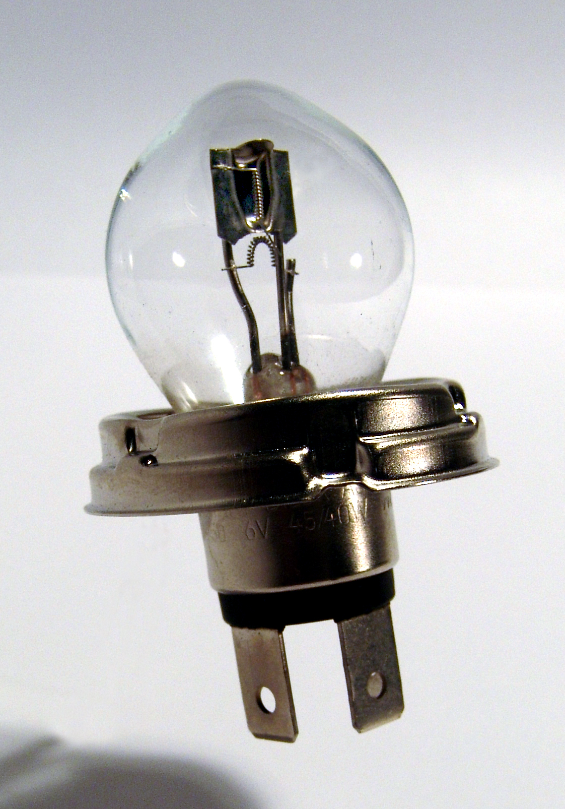 Osram_Bilux-As_6 Volt_45/40 Watt